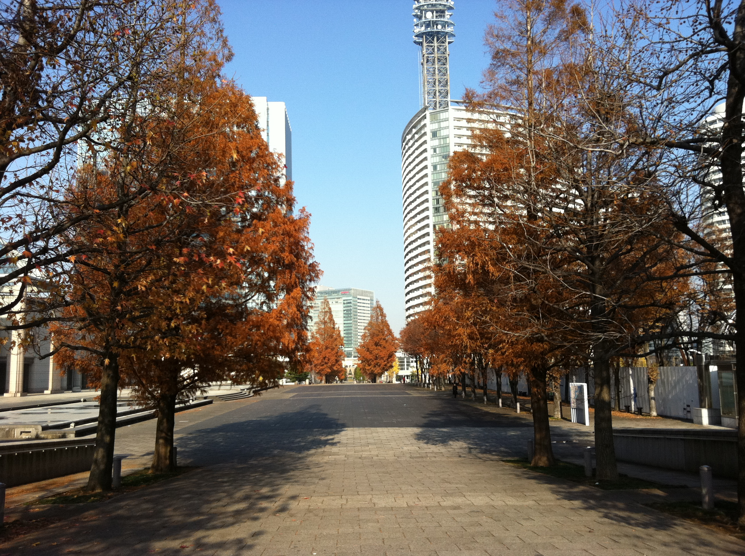 グランモール軸 美術館手前（2011年12月）。